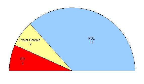 Composition du coonseil municipal de Cercola (province de Naples, région de Campanie, Italie).